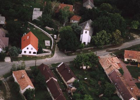 Tagyon, Hungary, aerialphotography